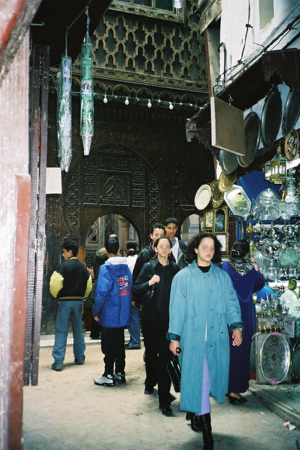 Mausolée d'Idris II dans le souk de Fès (visages floutés volontairement)